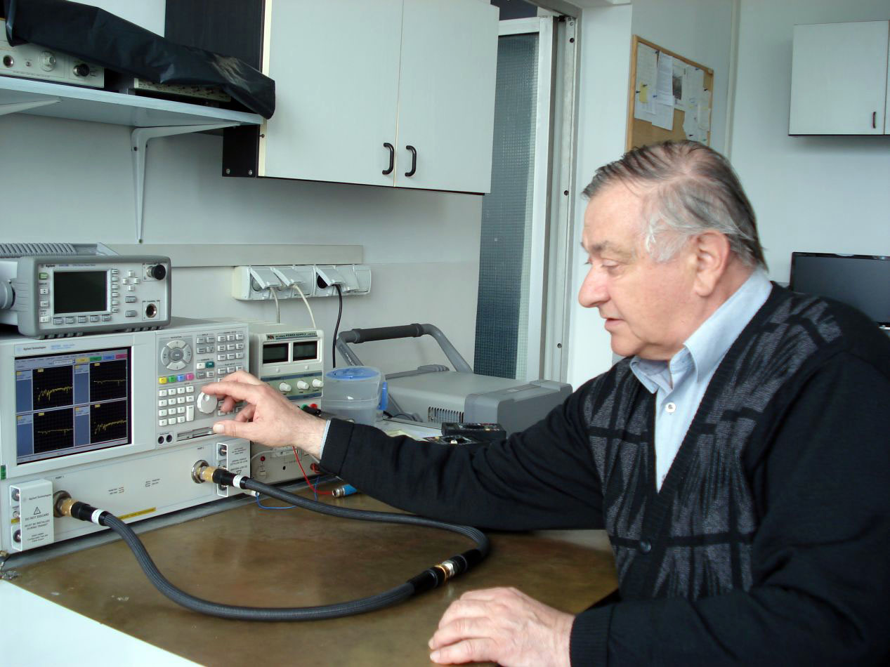 prof. Tadeusz Morawski w Laboratorium Techniki Mikrofalowej Instytutu Radioelektroniki Politechniki Warszawskiej wykonuje pomiary za pomocą wektorowego analizatora sieci na pasmo do 50 GHz.